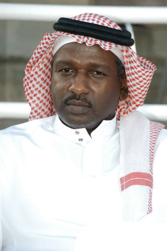 اللاعب الدولي السعودي ولاعب نادي النصر السابق ماجد عبدالله في يناير 2012.